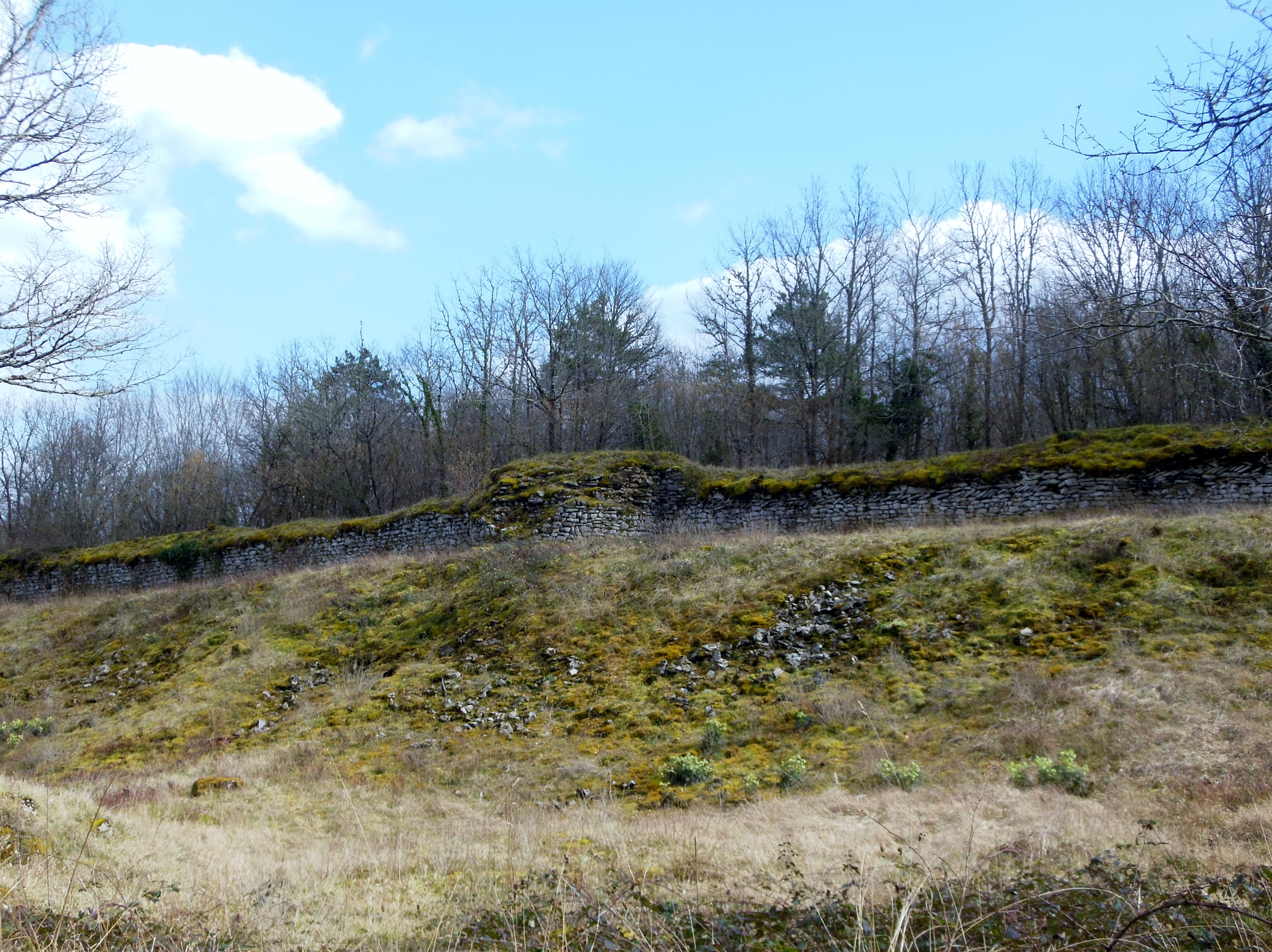 Mur du camp de Cora, à Saint-Moré (Yonne)